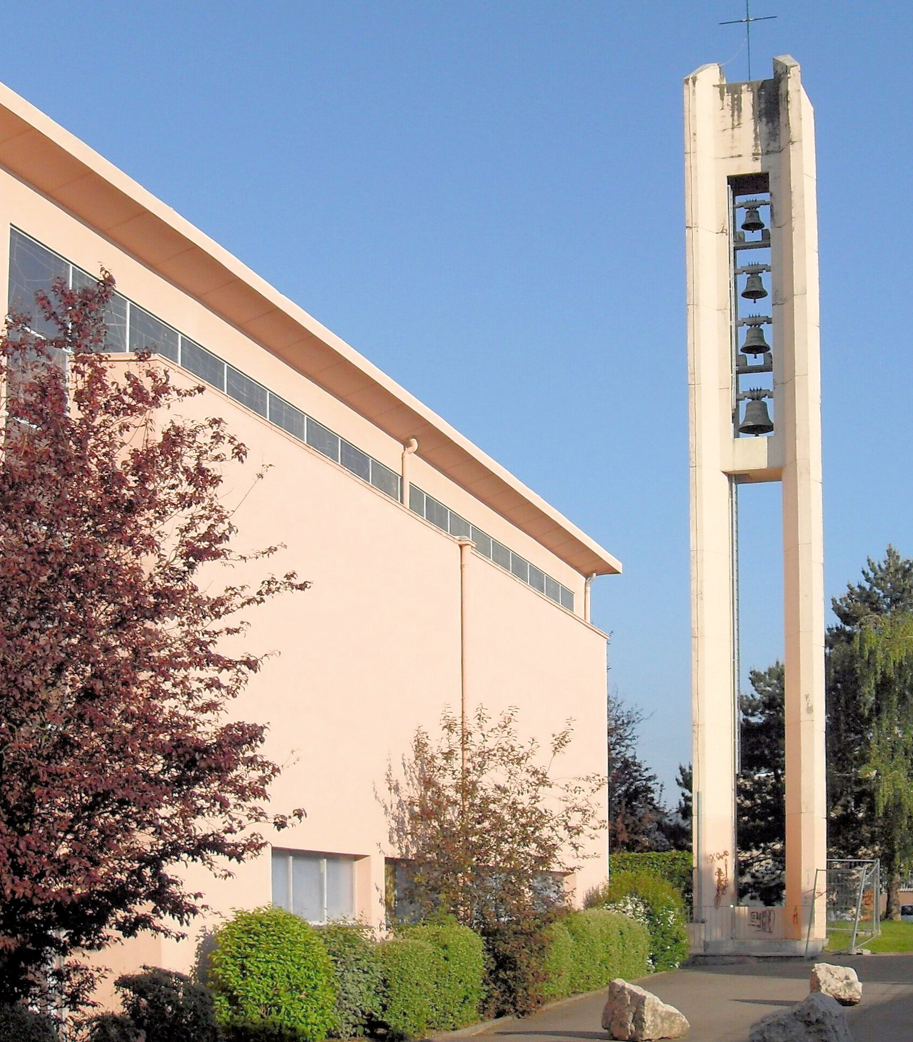 Clocher de l'église Sainte-Odile à Vieux-Thann